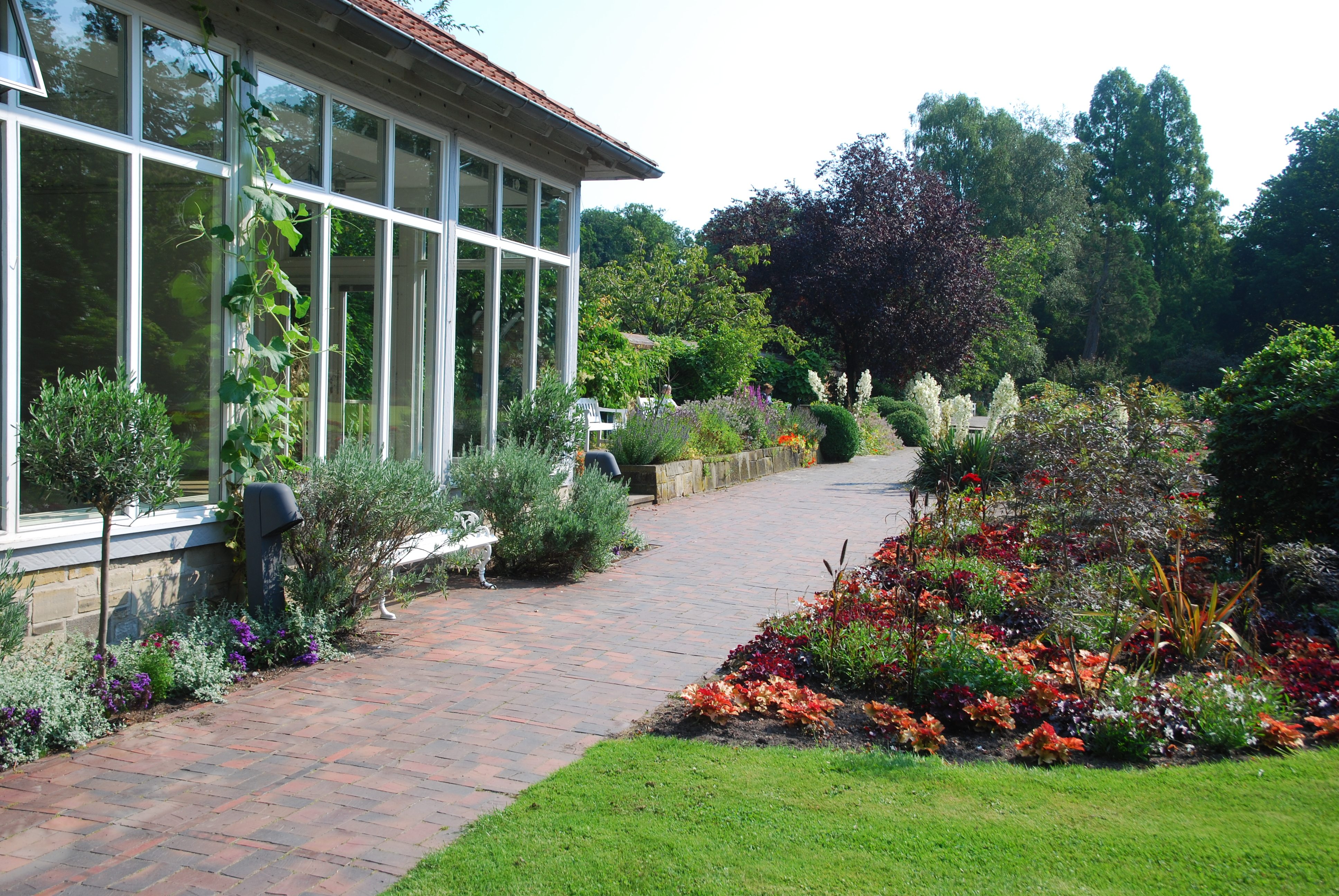 glasspavillon